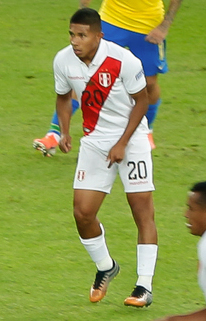 (Rio de Janeiro - RJ, 07/07/2019) Presidente da República, Jair Bolsonaro, durante a final da Copa América 2019, entre as seleções do Brasil e Peru. Foto: Carolina Antunes/PR